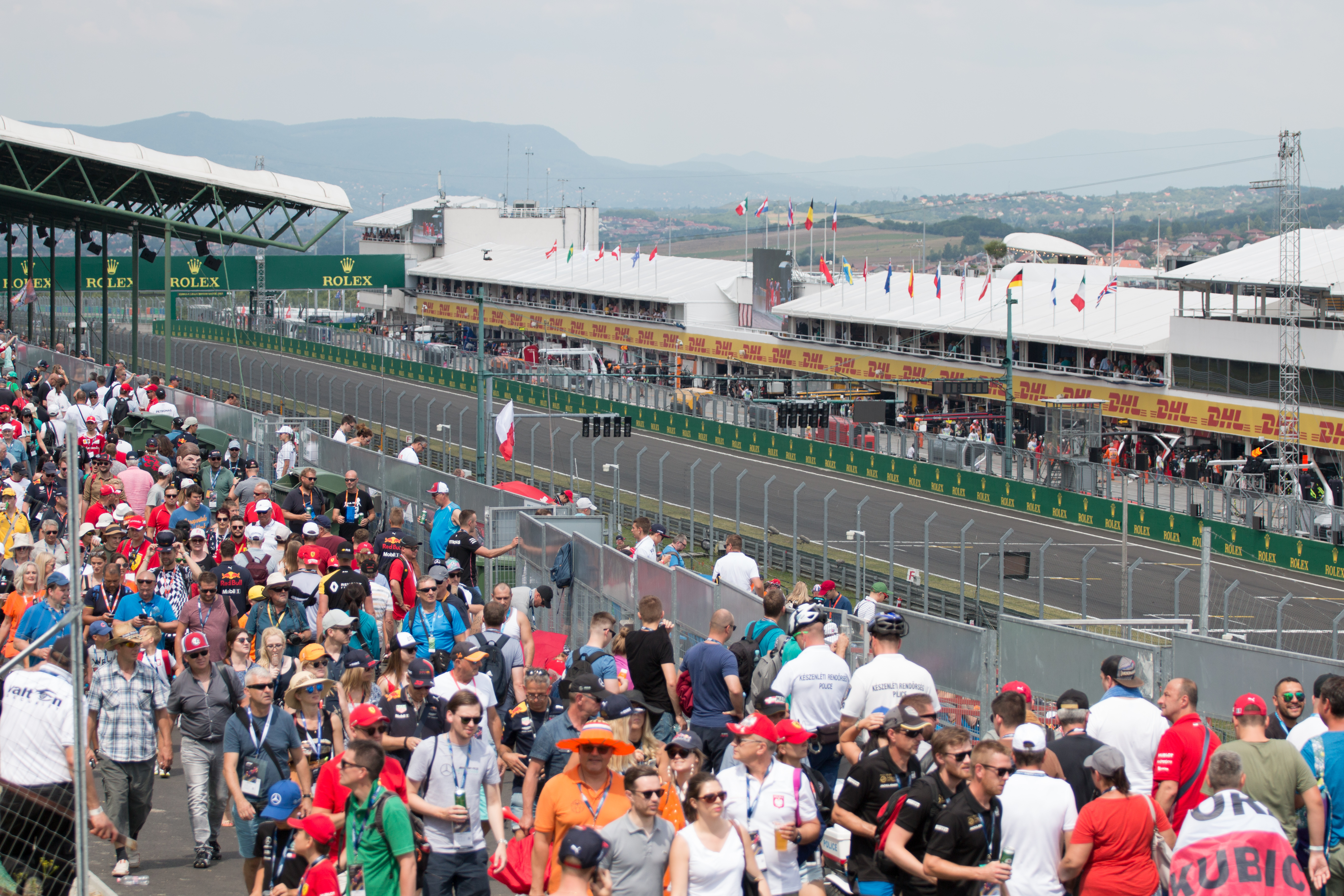 Hungarian Formula 1 GP 3rd practise session. View on the Hungaroring's main straight and pit lane.